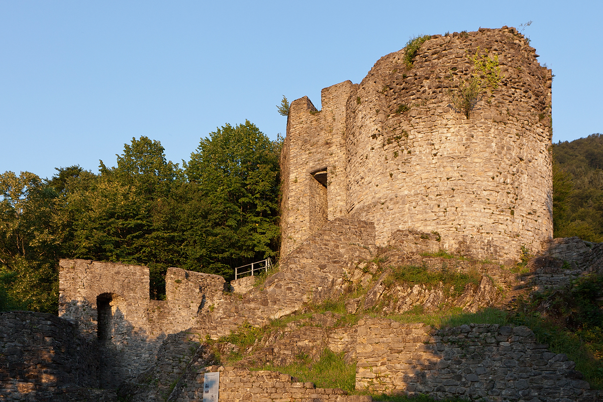 Ruine Unspunnen in Wilderswil, Berner Oberland